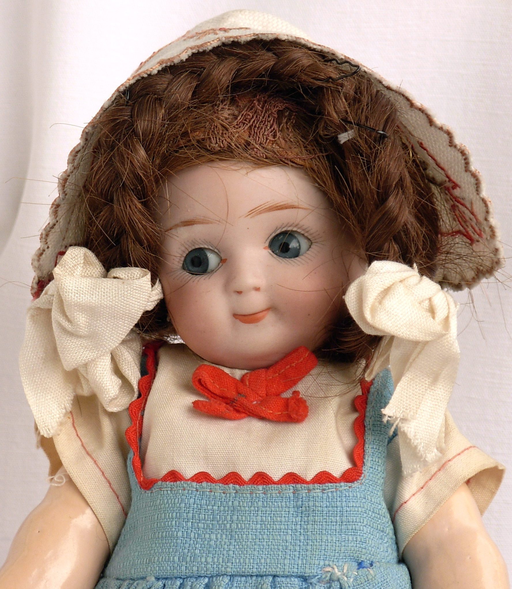 Sogenannte Schielaugenpuppe eines unbekannten Puppenherstellers mit einem Kopf auf Porzellan, der sich an den Marke Kewpi orientiert - hier auf einem Gliederkörper aus Masse ...